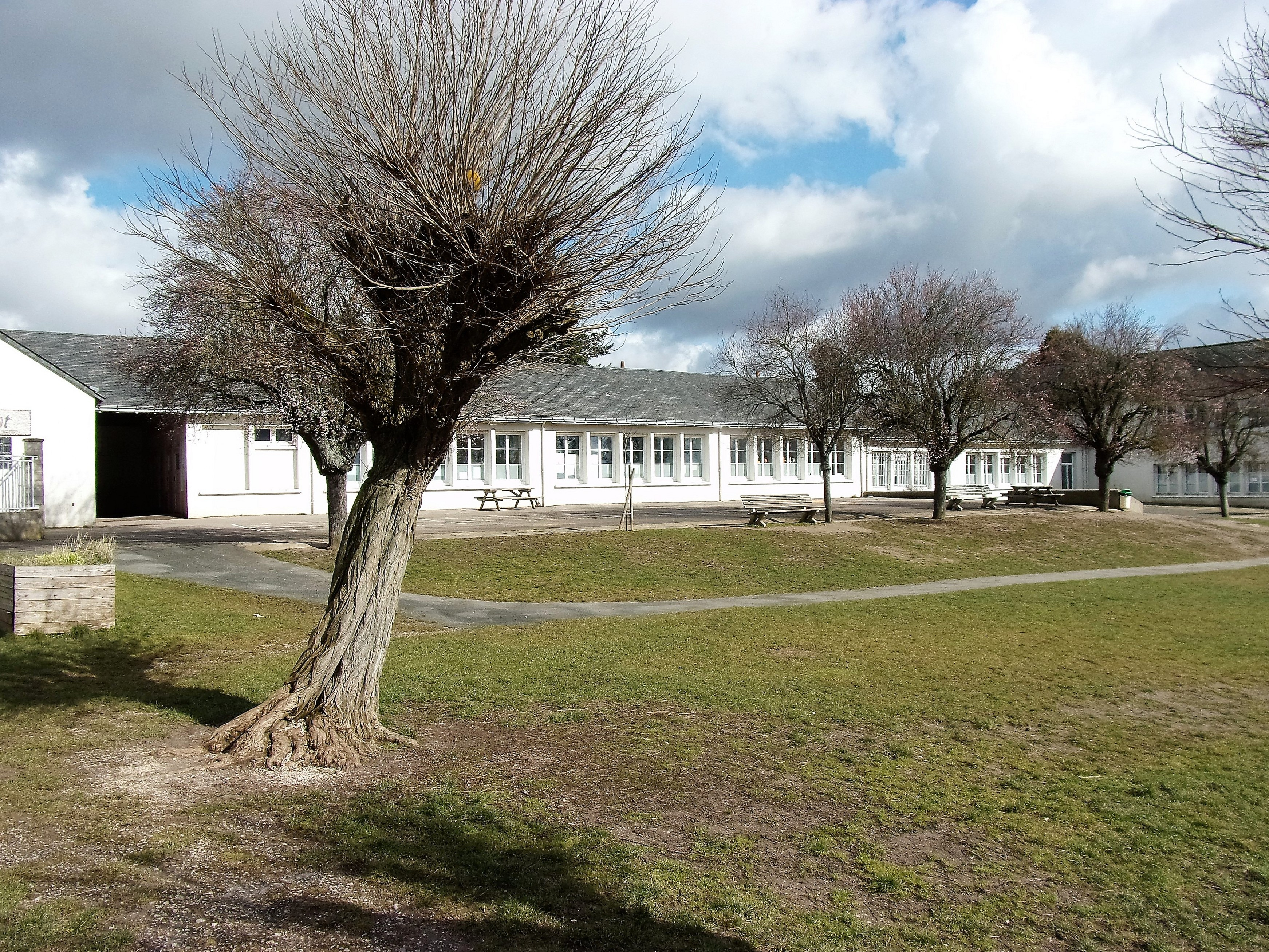 Cour de l'école Guy-de-Maupassant à Truyes